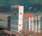 Pedro Santua, Zumaia